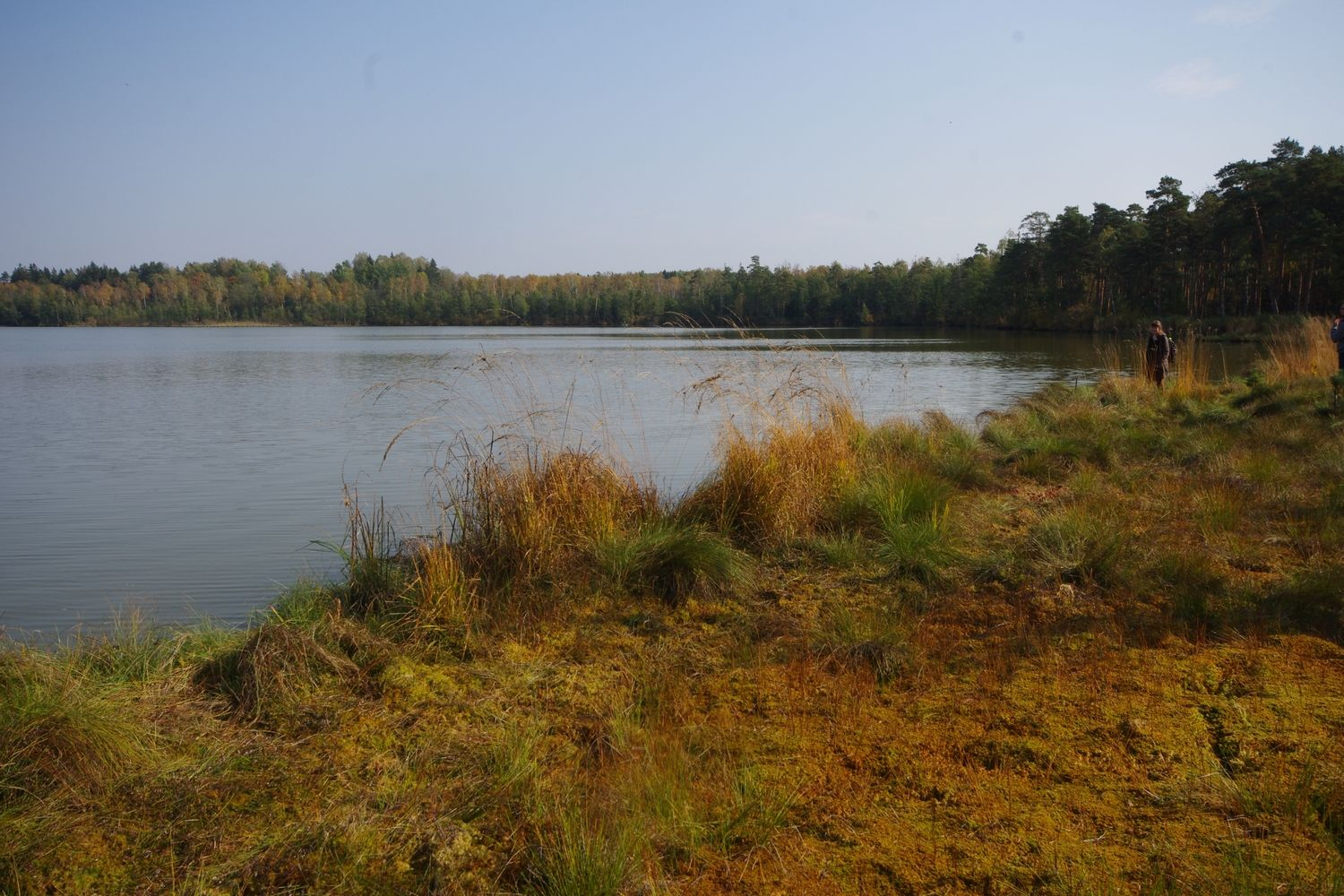 Alio ežeras Alionių pelkės masyve